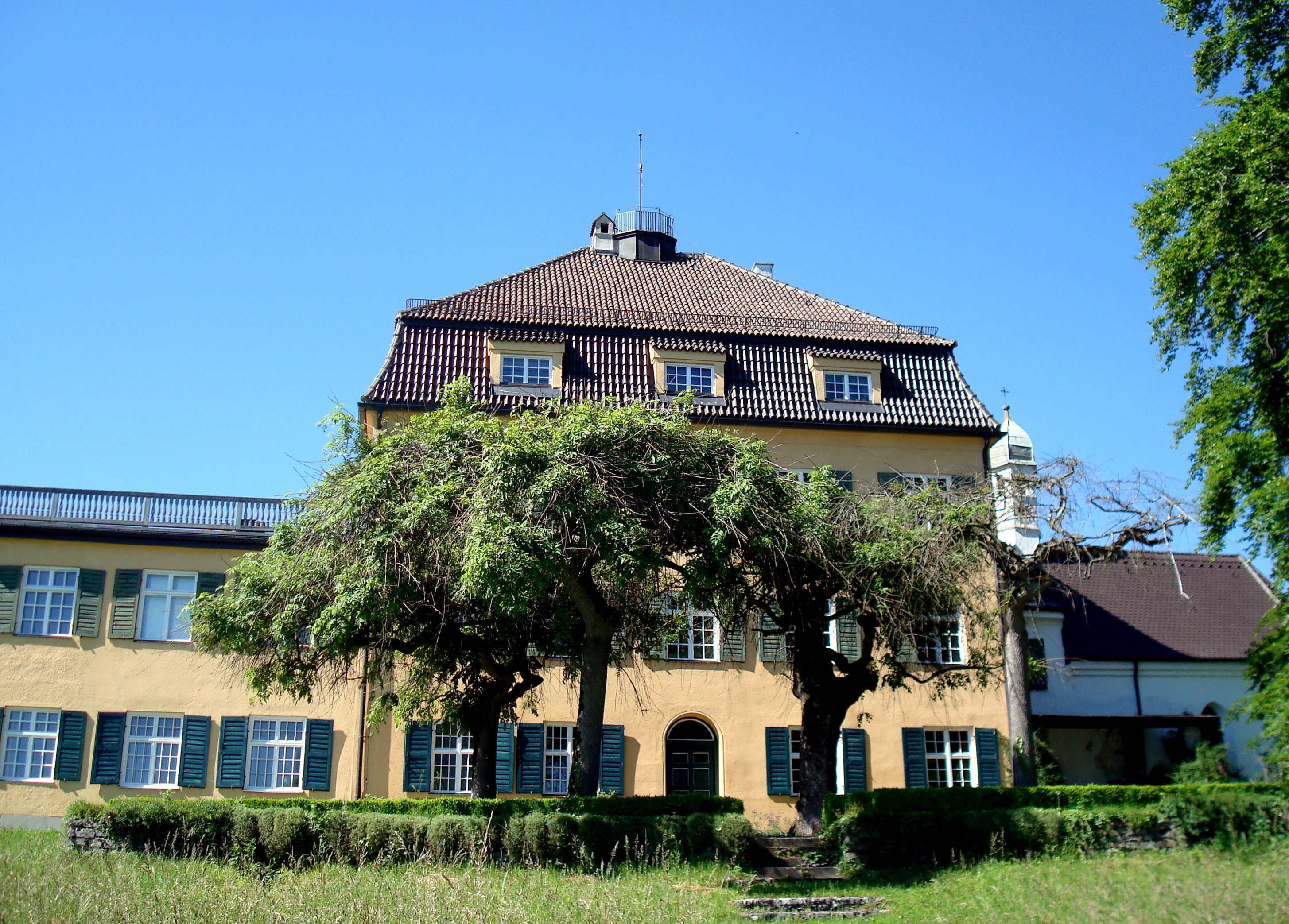 Herrsching, OT Ried. Südseite des Schlosses Rezensried.